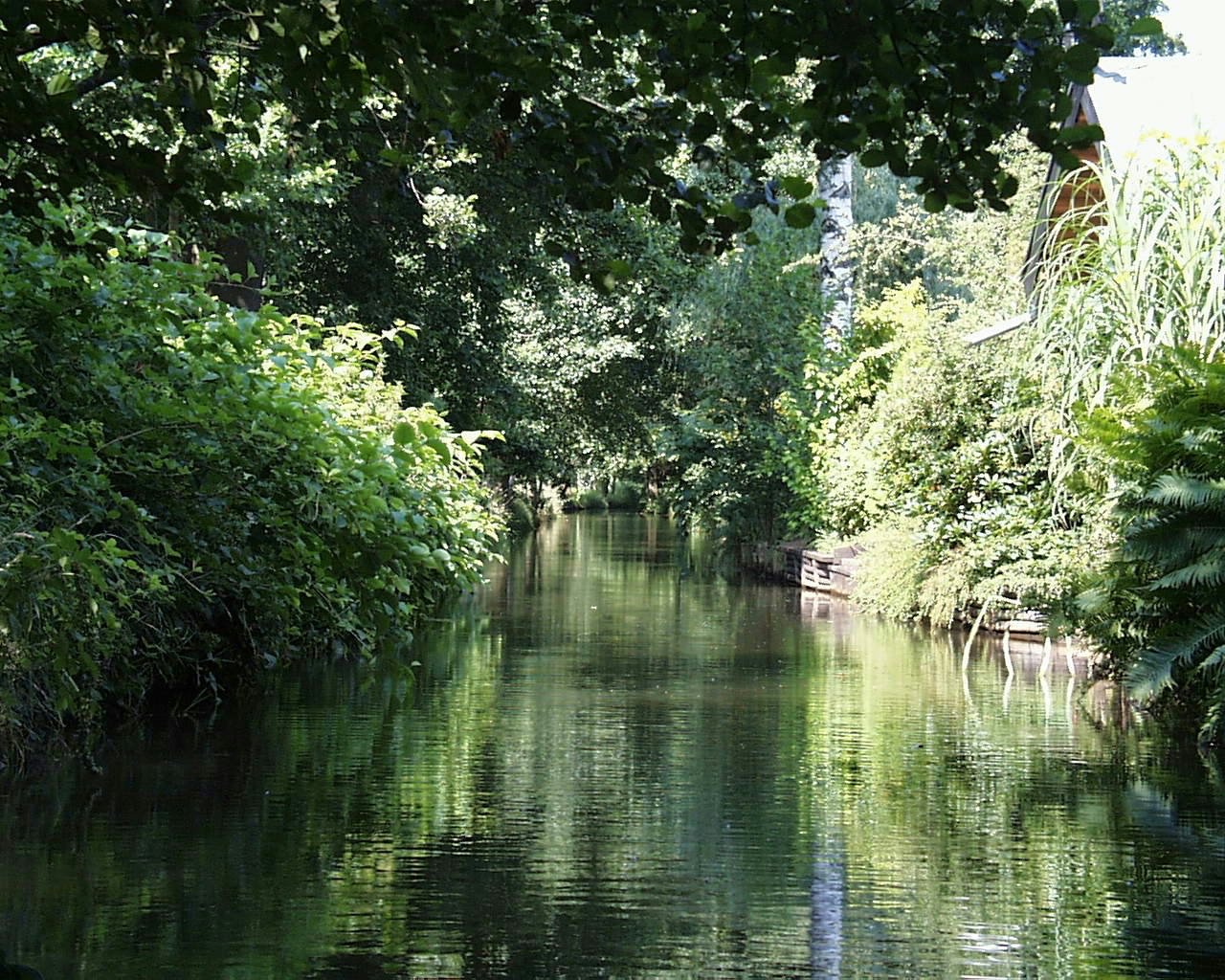 Ein Kanal bei Burg im Spreewald, Lausitz